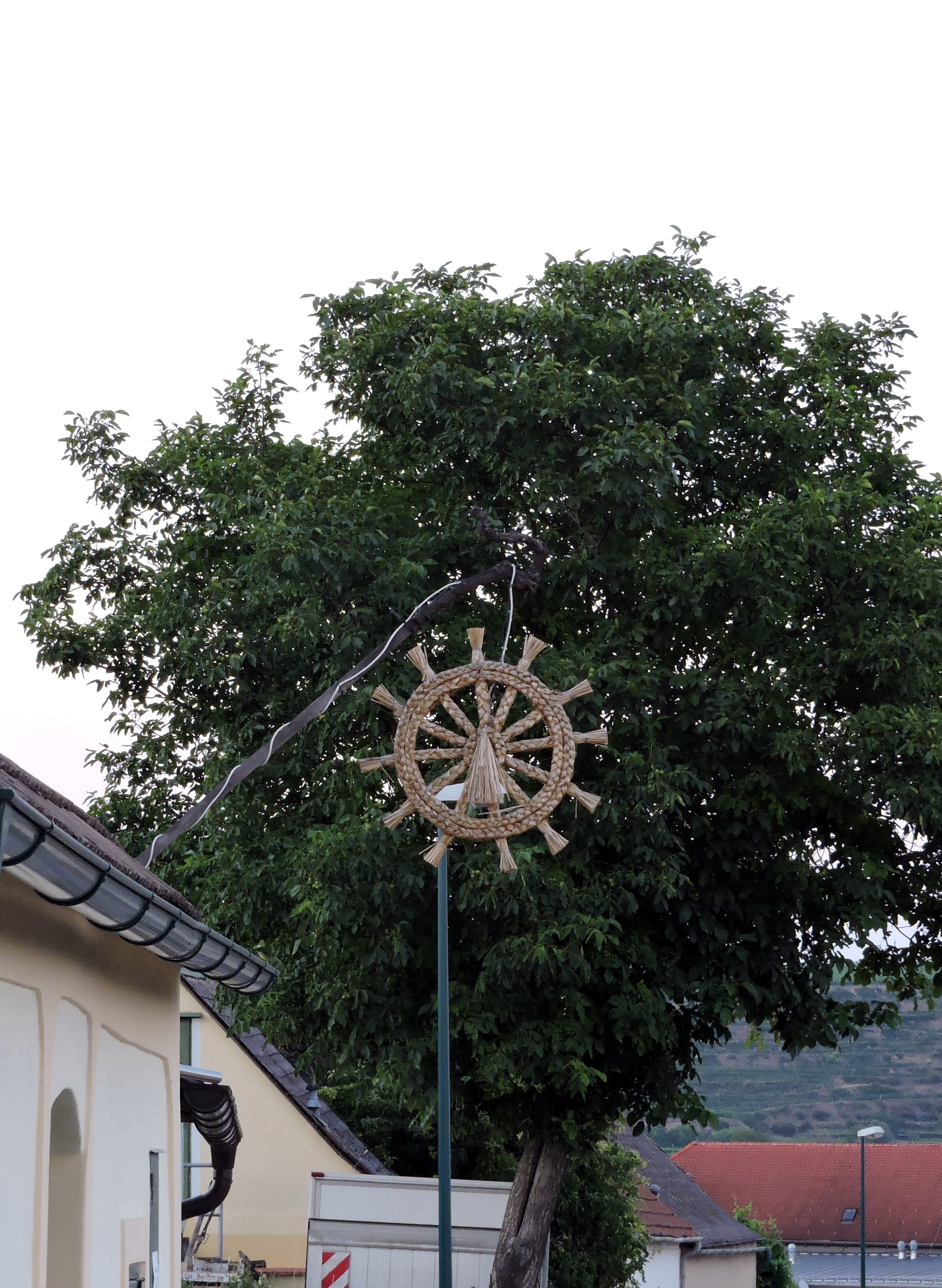 Typisches, regionales Buschenschankzeichen - Strohkranz - in Niederösterreich (Krems).